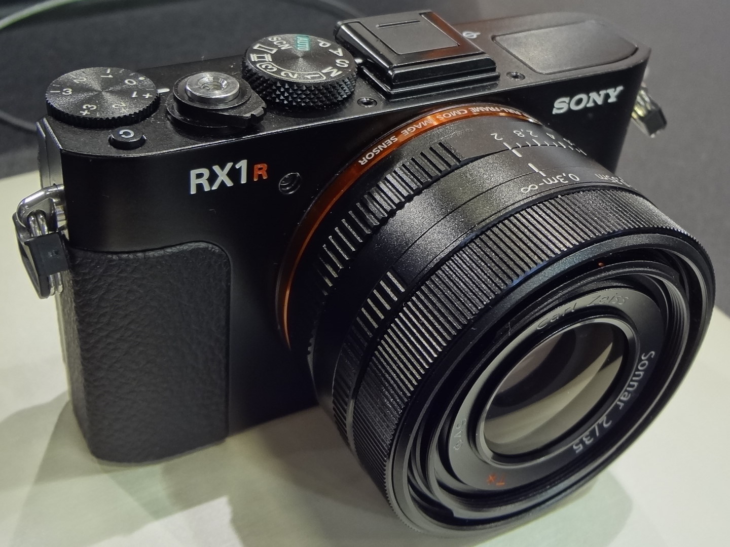 2013台北國際攝影器材暨影像應用大展，Sony攤位展示的數位相機DSC-RX1R。